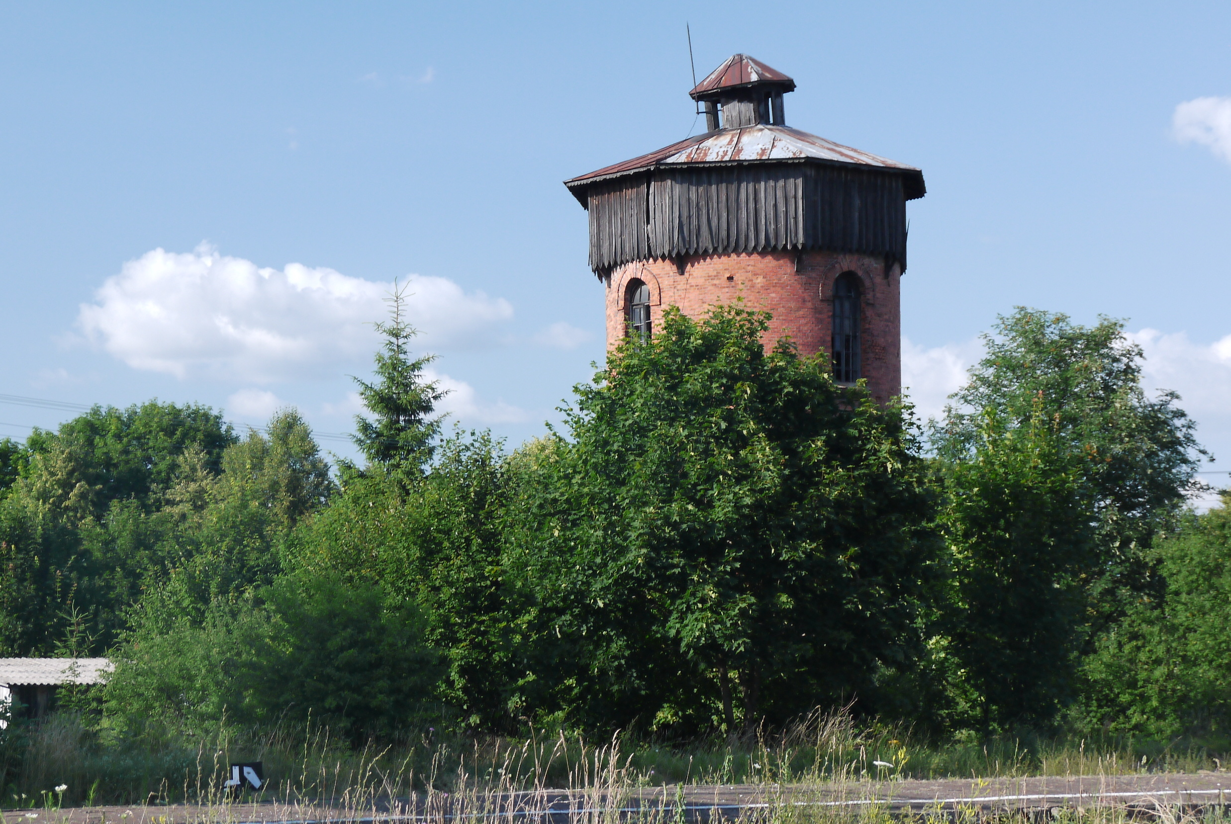 Zabytkowa wieża ciśnień na dworcu kolejowym w Nurcu-Stacji.